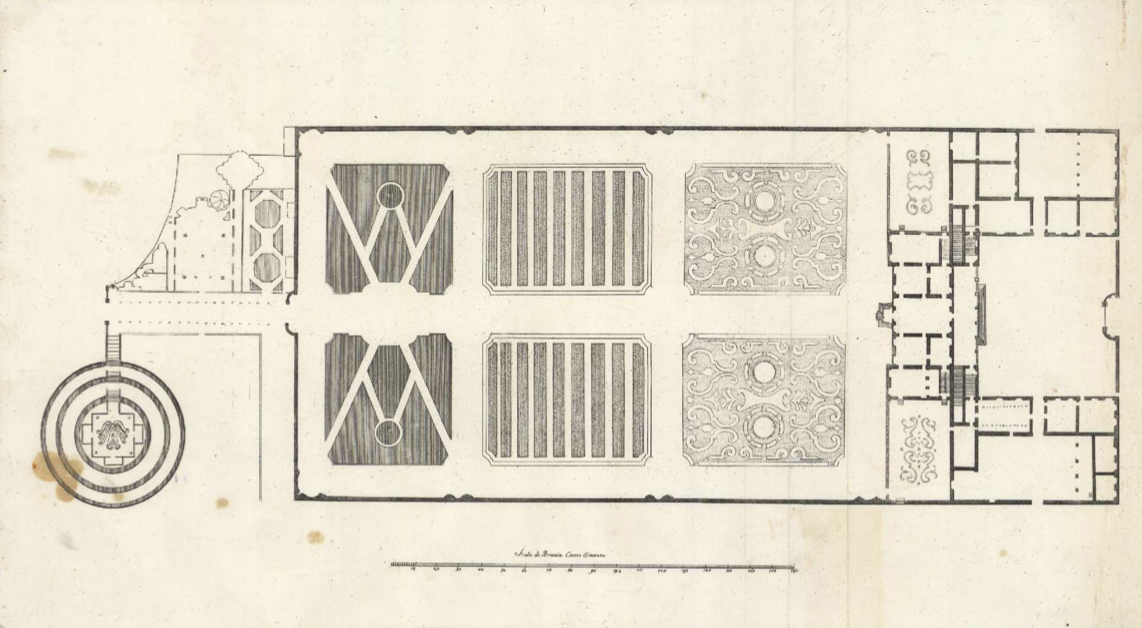 Pianta del giardino all'italiana di Villa Silva, a Cinisello.